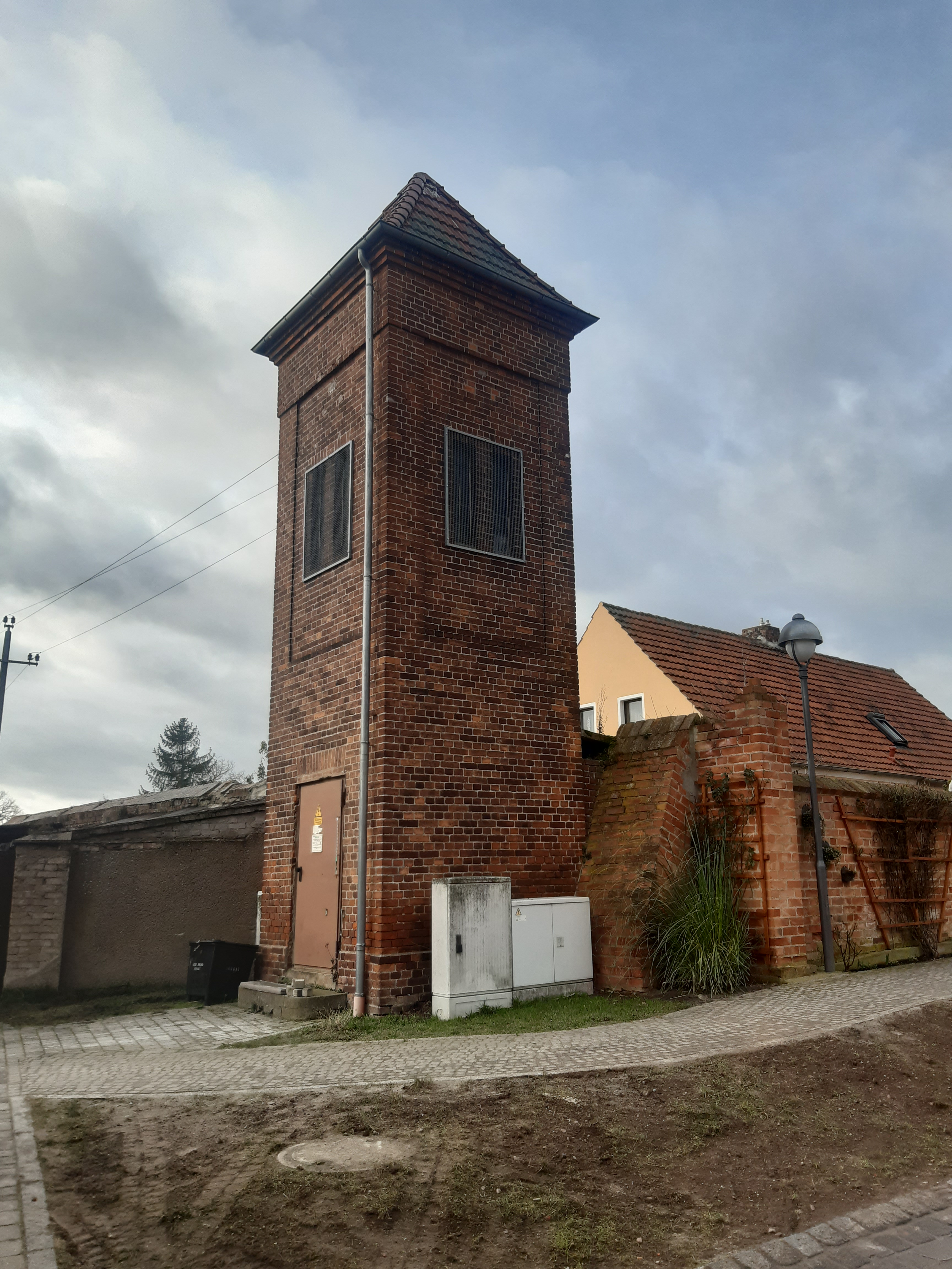 Trafo